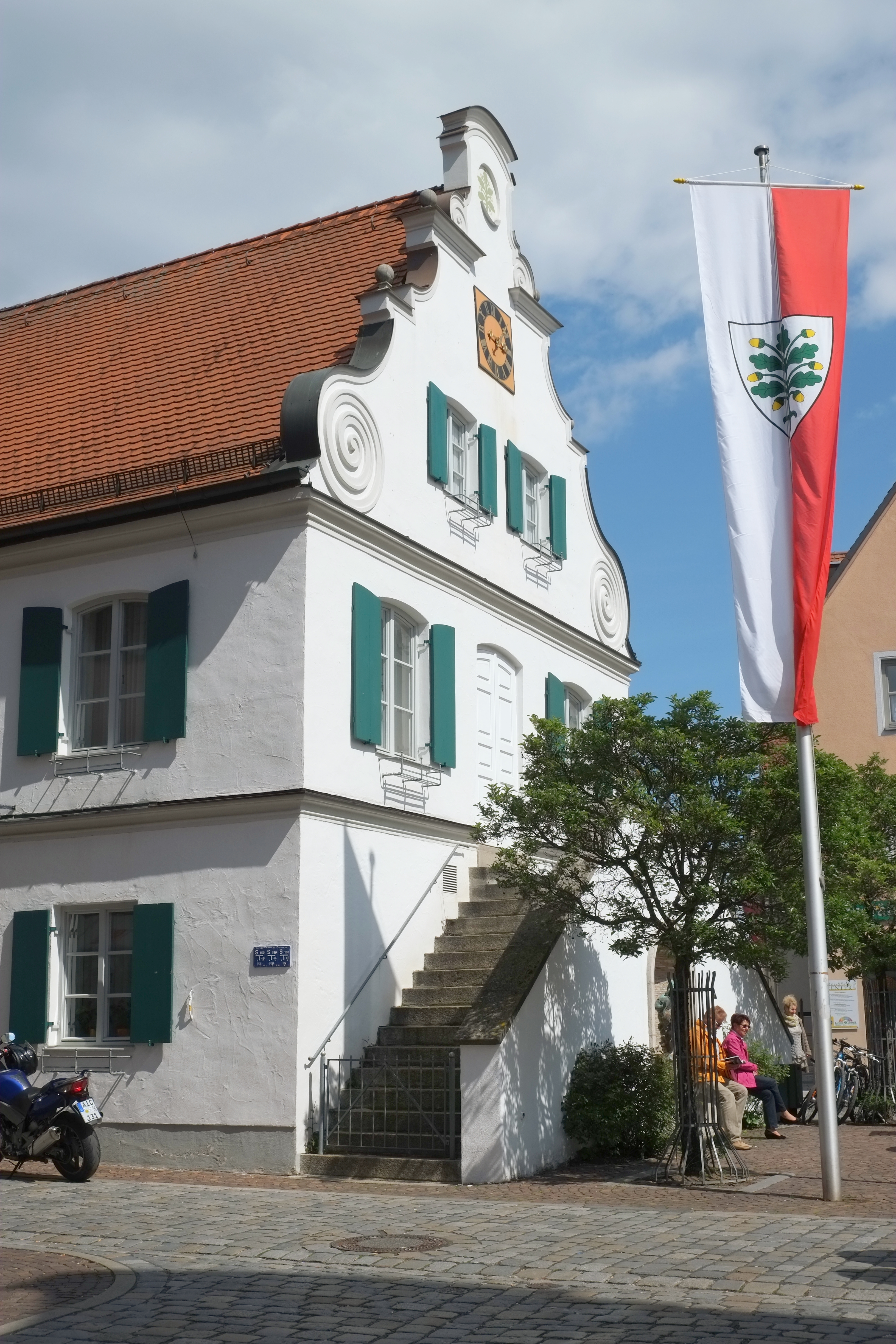 Rathaus in Aichach im Landkreis Friedberg-Aichach (Bayern, Deutschland)